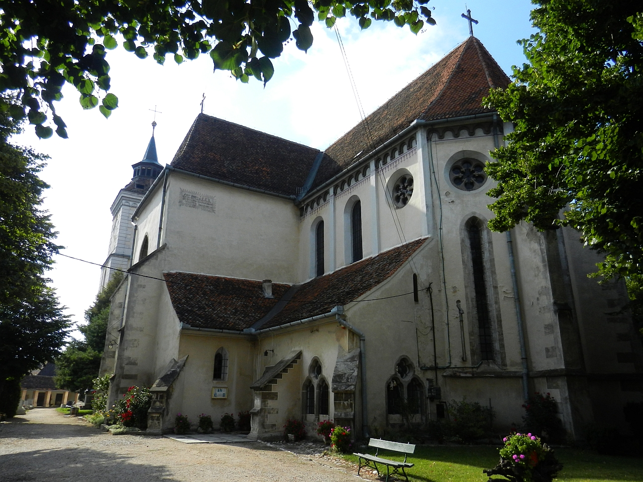 Biserica evanghelică „Sf. Bartolomeu” 01